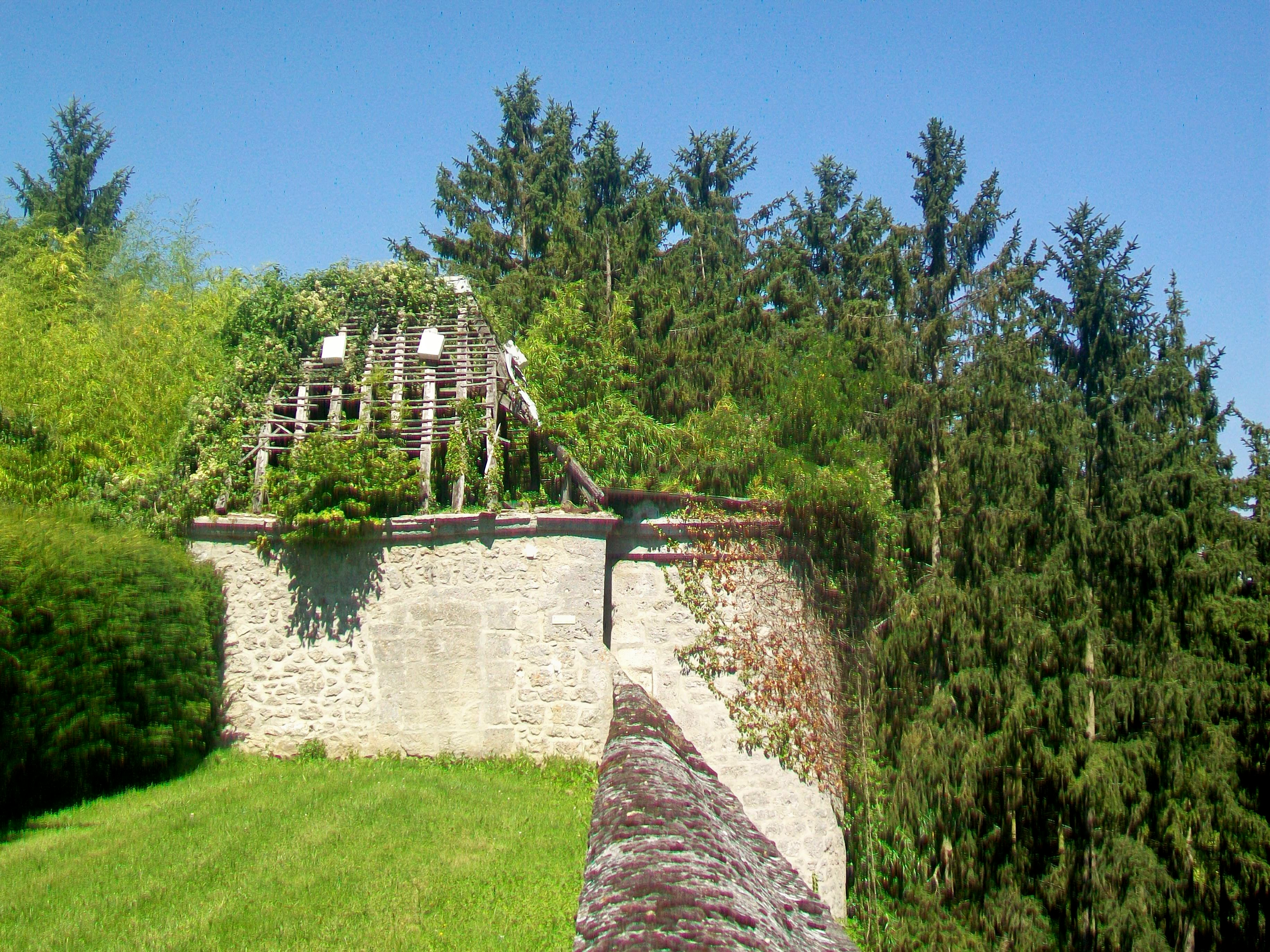 La tour-pavillon nord, à l'extrémité nord de la terrasse panoramique.